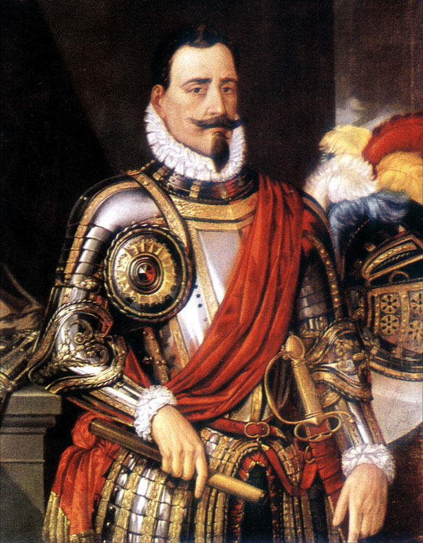 Pedro de Valdivia. Geschenk der Königin Isabella II. von Spanien an die Stadt Santiago de Chile